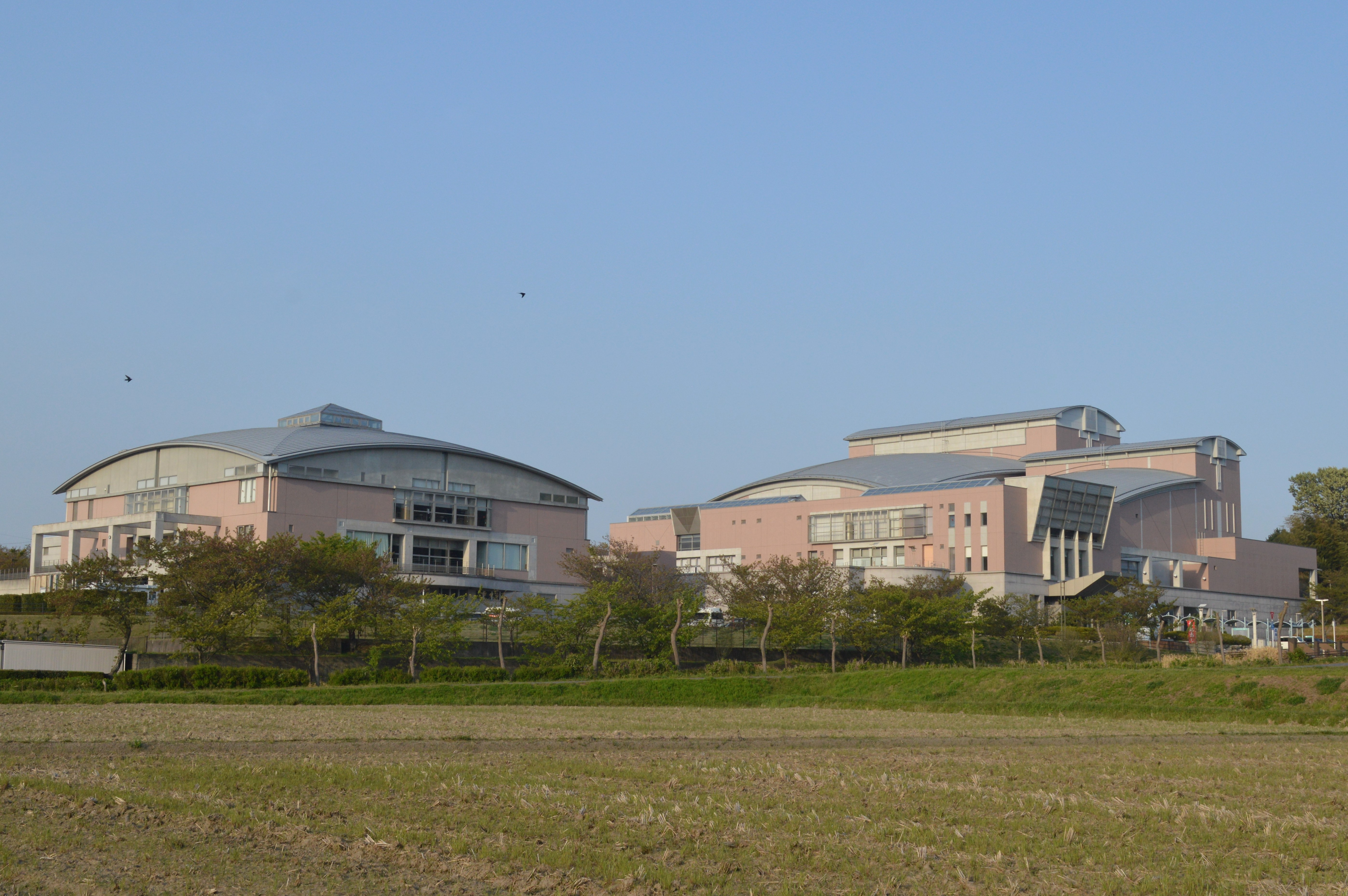 愛知県額田郡幸田町のハッピネス・ヒル・幸田。幸田町立図書館（左）と幸田町民会館（右）。